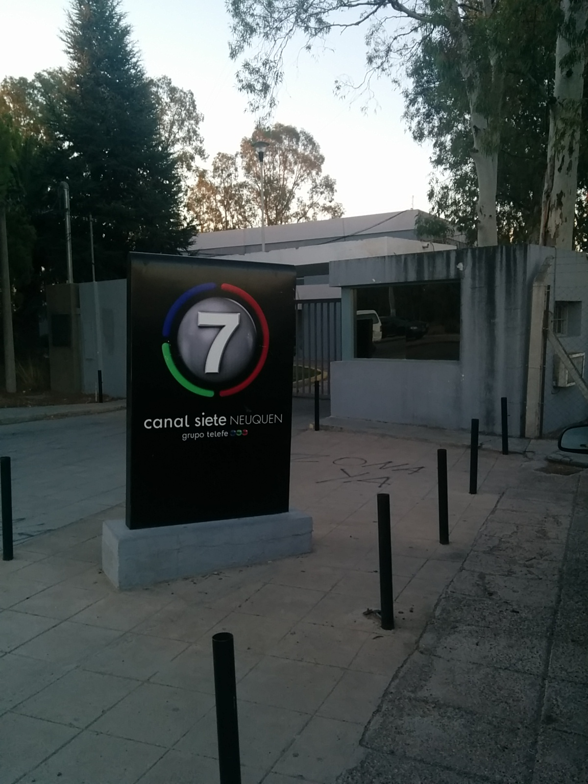 Cartel e ingreso a las instalaciones de Canal 7 de Neuquén (Telefe Neuquén), estación propia de la cadena Telefe.